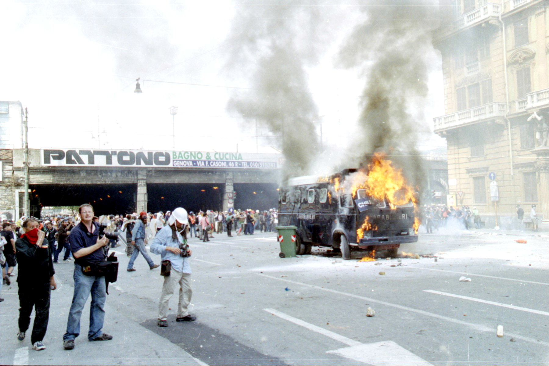 Genova - Fatti del G8 del 20 luglio 2001 Incidenti a Corso Torino (pressi di Brignole)